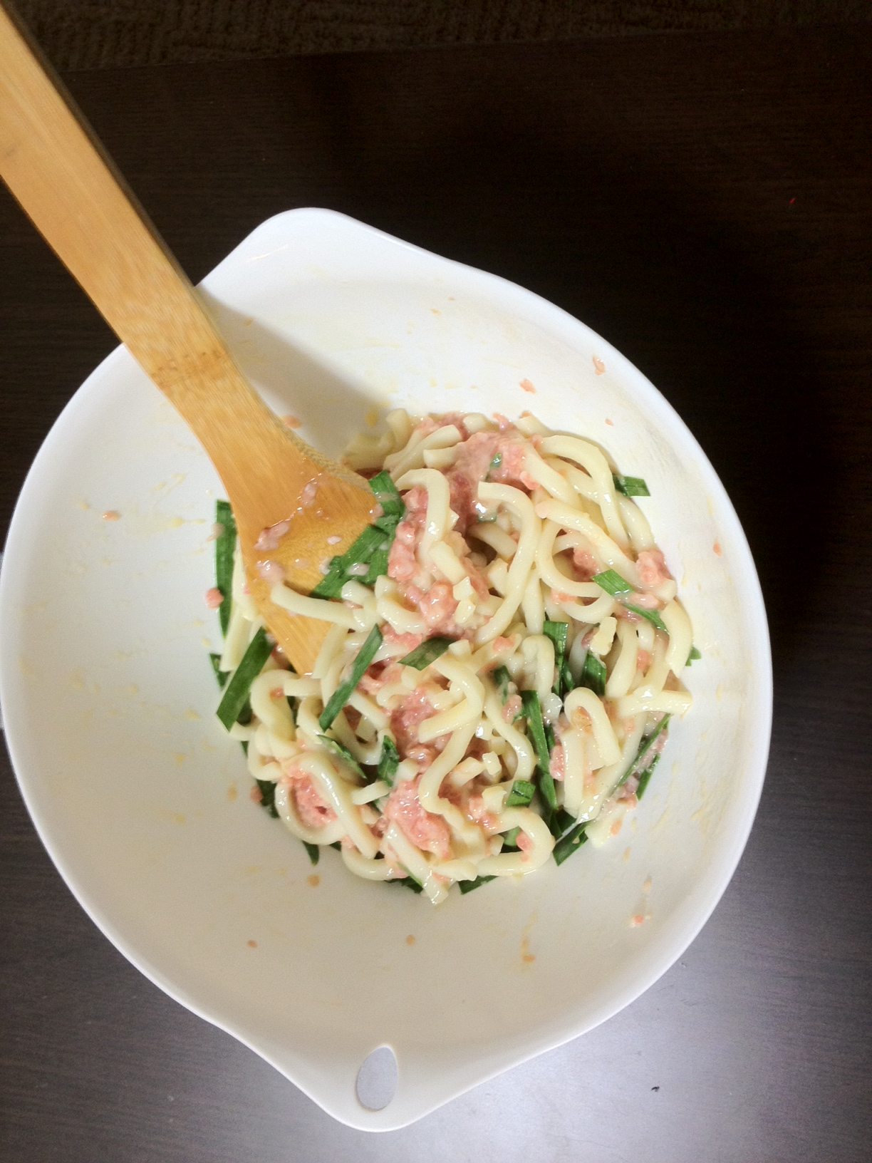 うどん餃子完成前